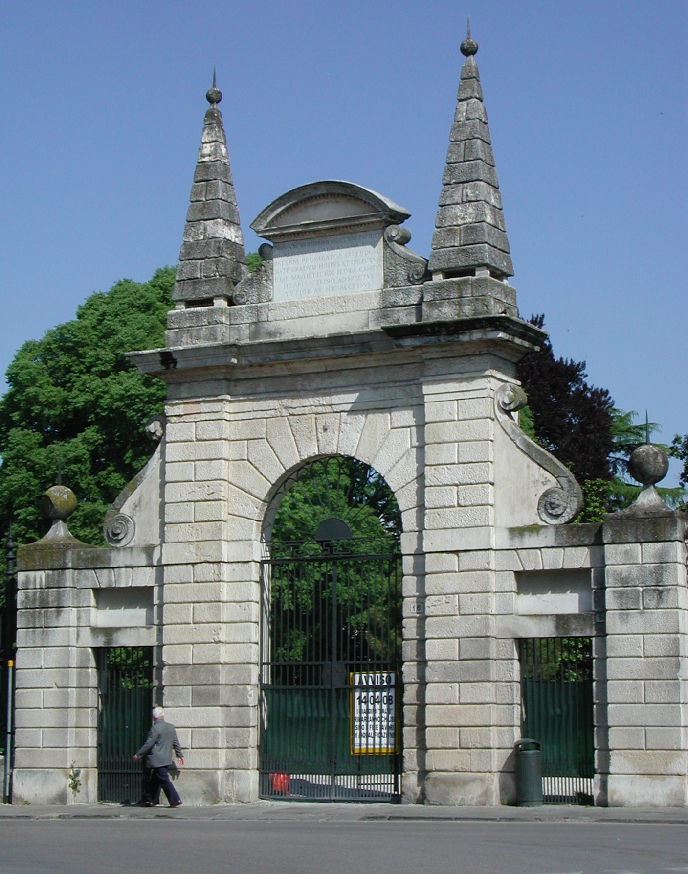 Arco d'ingresso dei Giardini Salvi a Vicenza (detto "Arco del Revese"). Un arco trionfale analogo ma più grande, fatto erigere nel 1608 da Pier Paolo Battaglia, Capitano di Vicenza, lungo l'attuale Viale Roma, ed attribuito all'architetto Ottavio Bruto Revese, fu demolito in occasione di una visita di Benito Mussolini nel 1938, per far passare il corteo fascista.